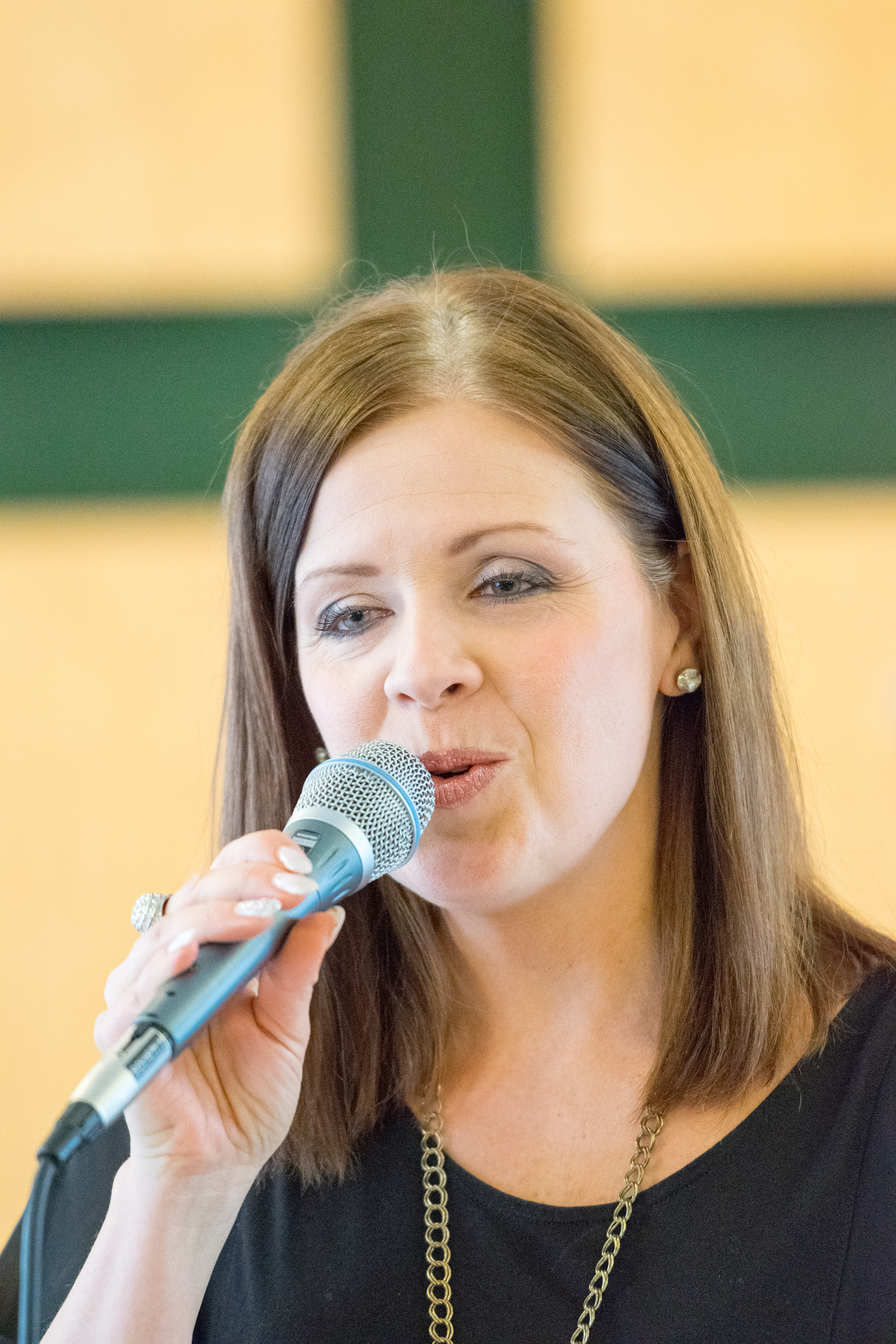 Elina vettenranta suomalainen laulaja